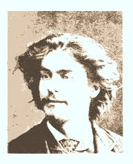 photo d'Aristide Bruant